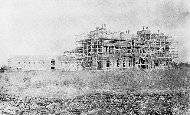 明治35年のシャトー本館